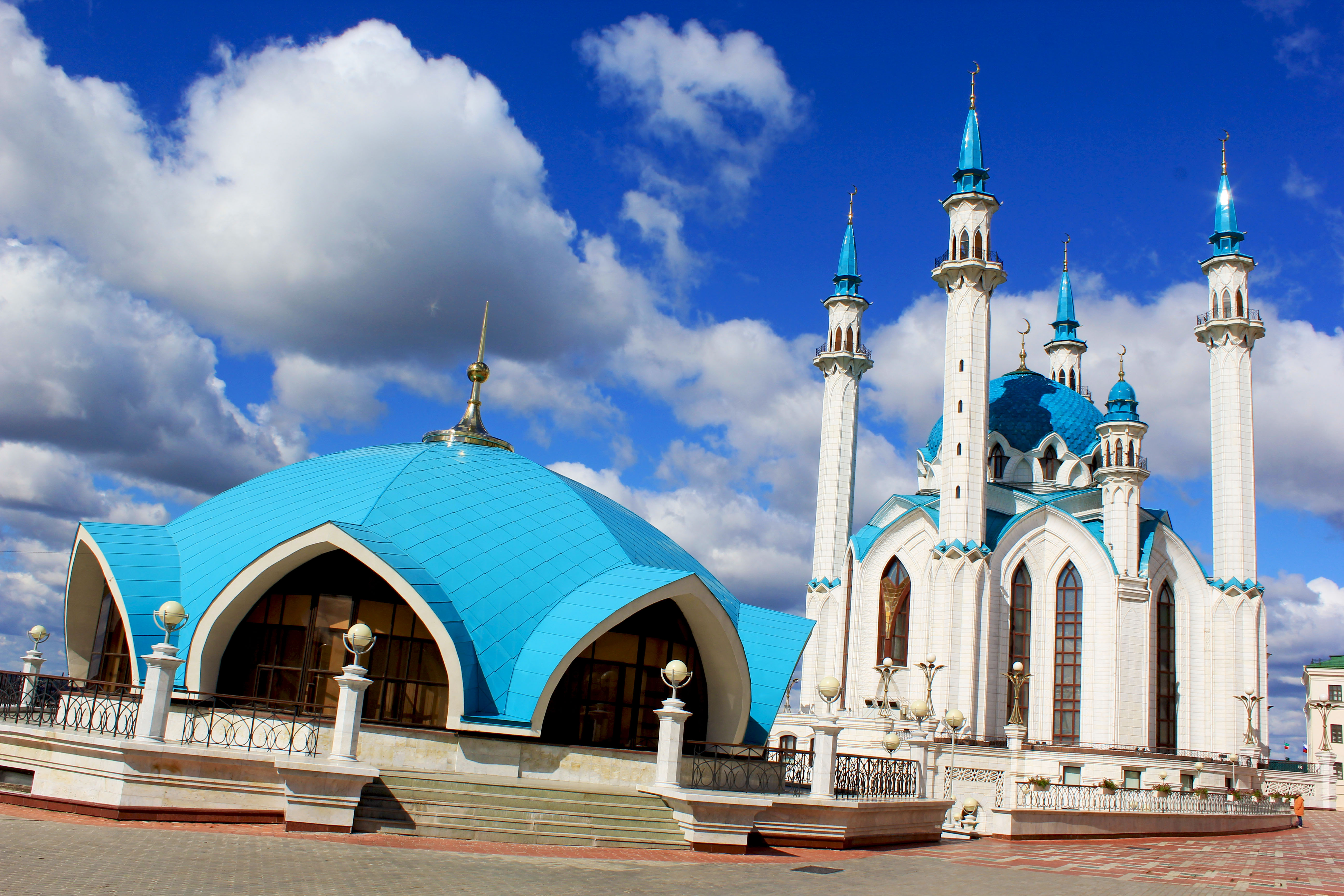 Мечеть Кул-Шариф г.Казань